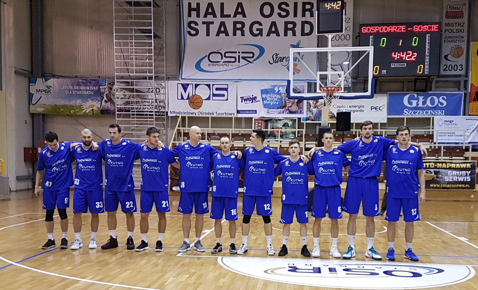 Polfarmex Kutno